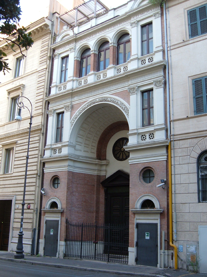 Eglise de Saint Marone, à Rome, dans le "rione" Ludovisi.